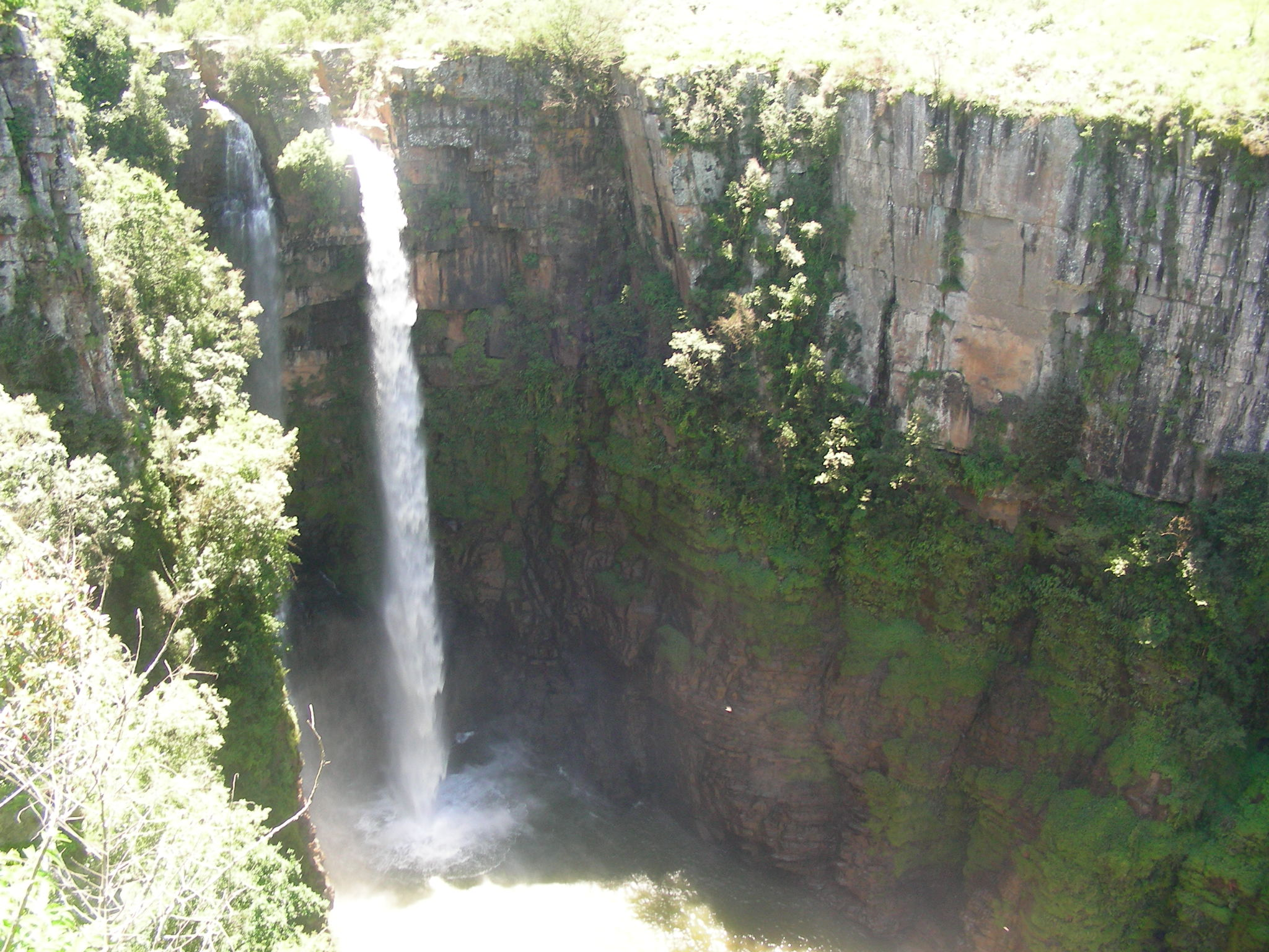 Escarpment/Panorama Route Mpumalanga, South Africa